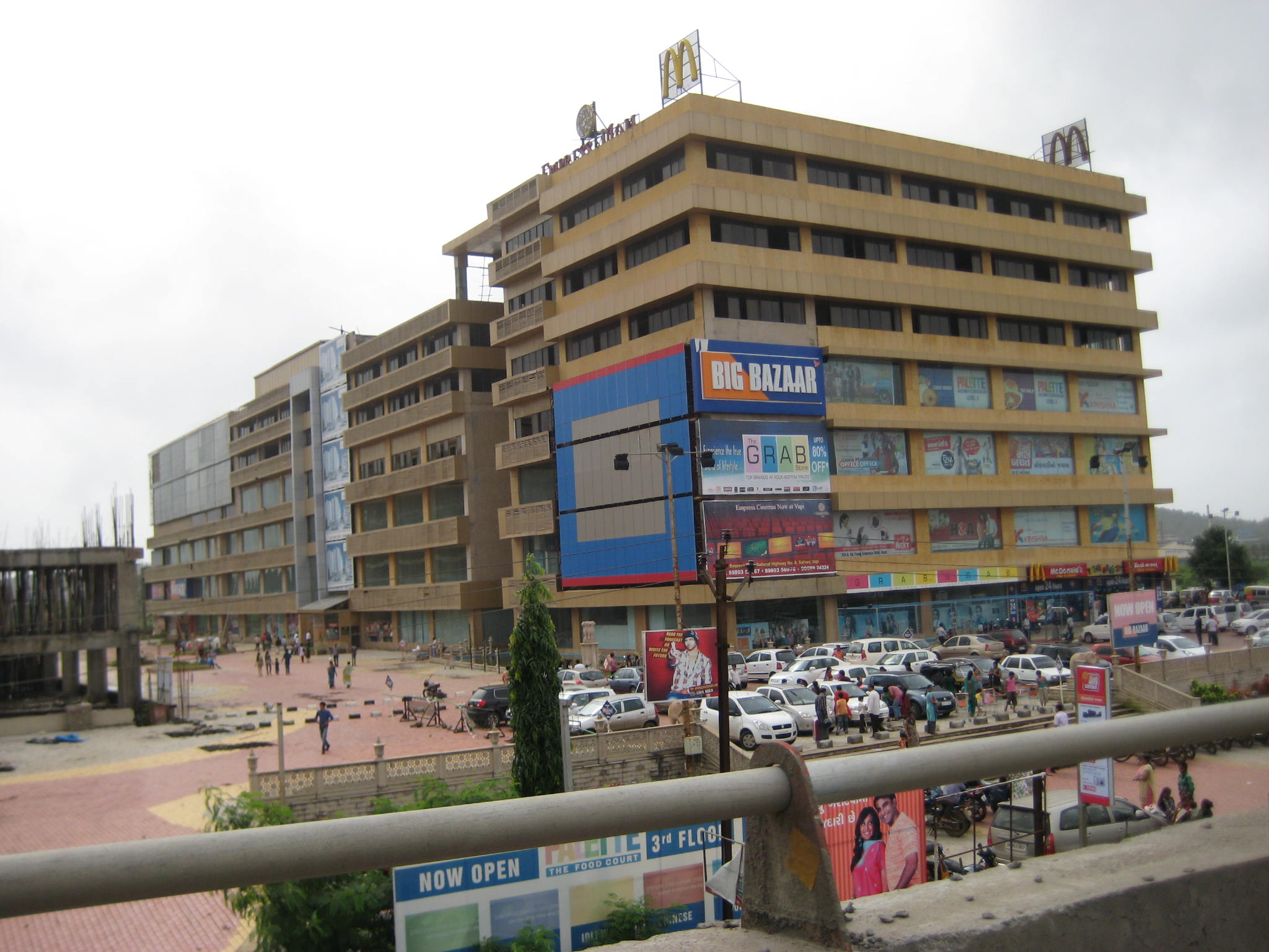 Big Bazar, Salvav, Vapi